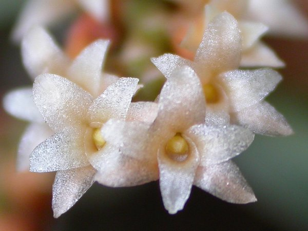 Campylocentrum neglectum - São Paulo